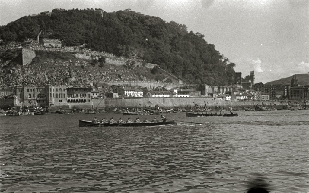 Título original: Regatas de traineras en la bahía de la Concha (13/127) Localización: San Sebastián (Guipúzcoa)